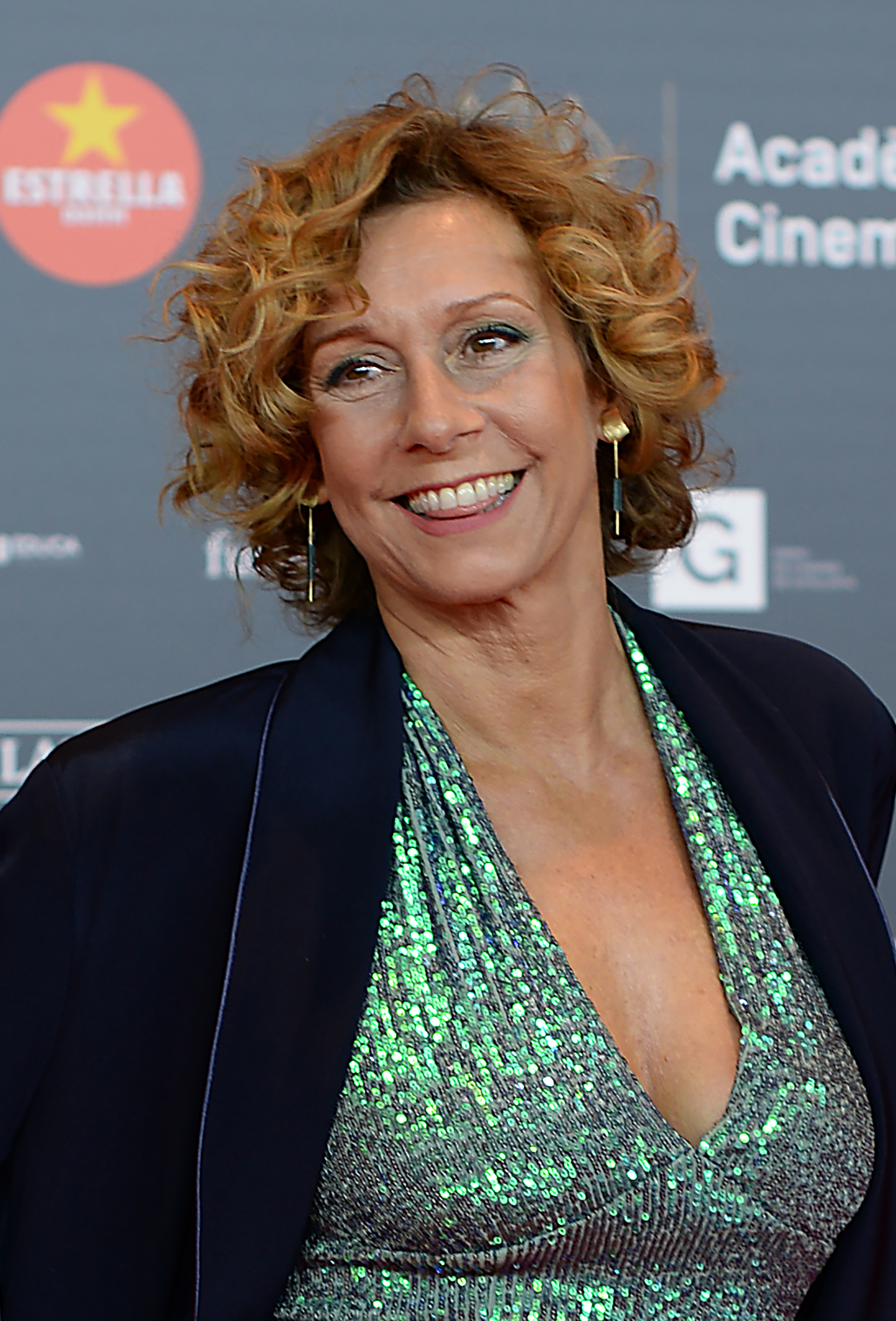 Àngels Gonyalons, actriu i cantant, XII Premis Gaudí (2020)